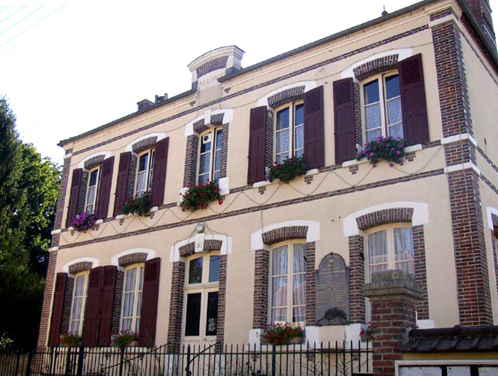 Mairie